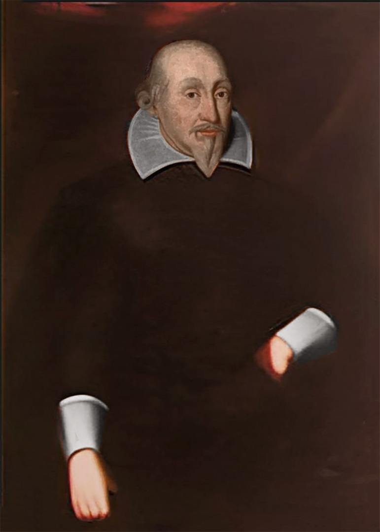 Enno III. Cirksena, unsigniertes Portrait